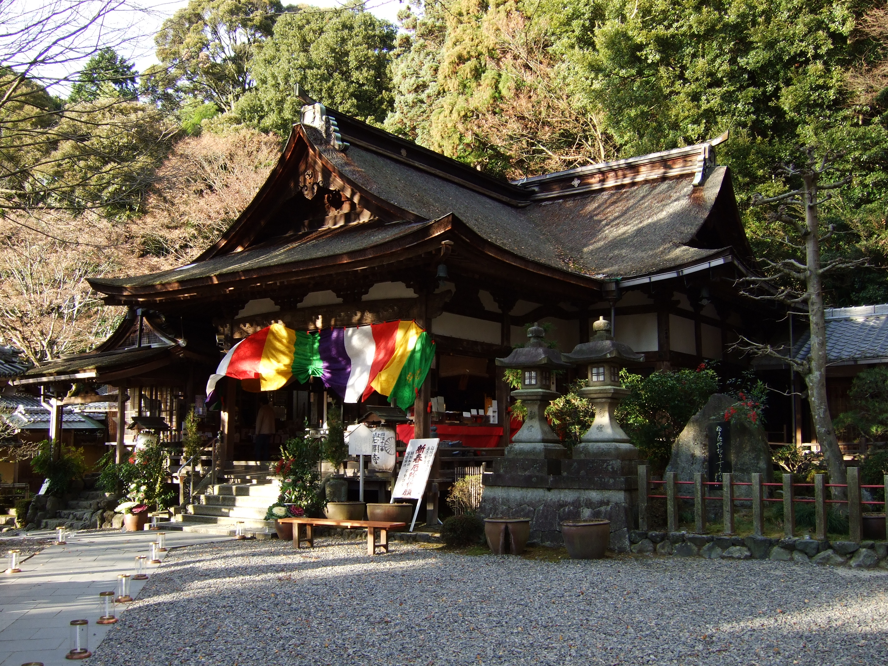 正法寺 (大津市)